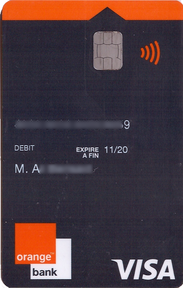 Carte bancaire Visa - Orange